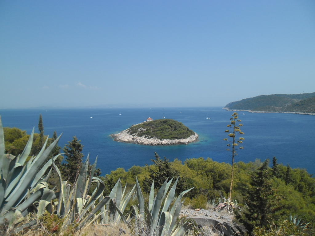 grad Vis